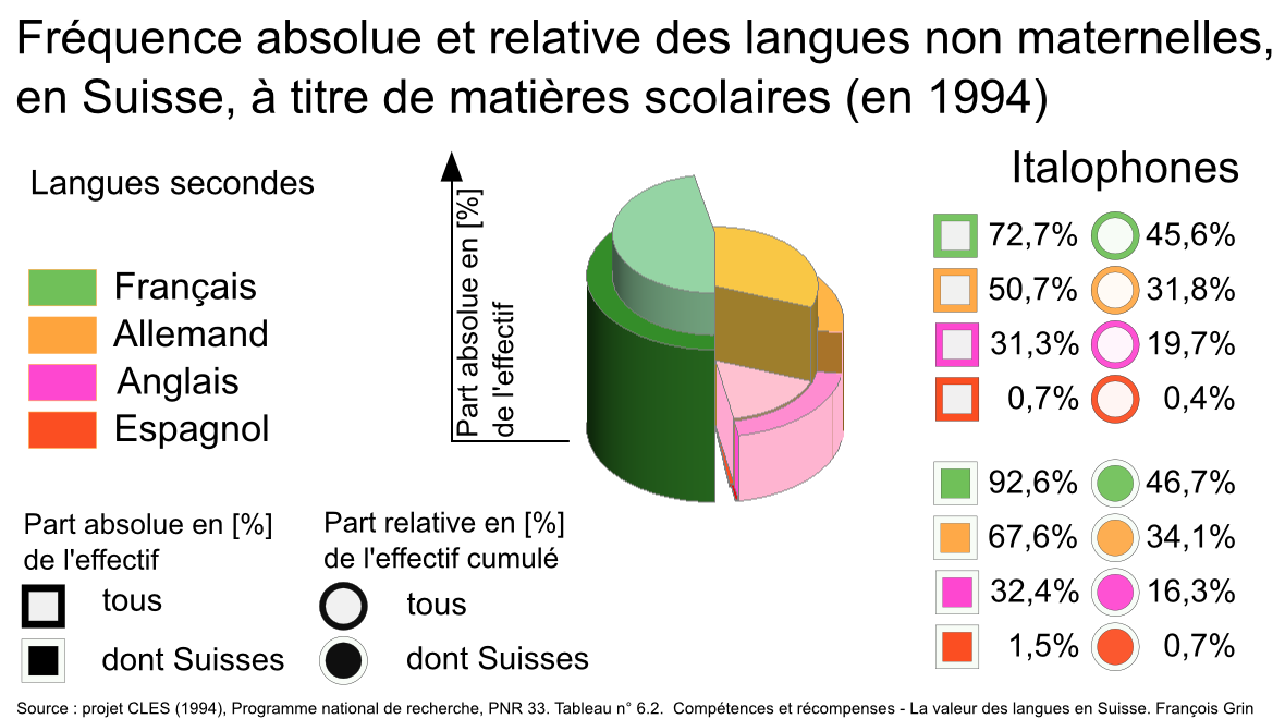 Fréquence absolue et relative des langues non maternelles, en Suisse, à titre de matières scolaires (en 1994). Pour les italophones. Graphique réalisé sur la base du tableau n° 6.2, p. 110 du livre Compétences et récompenses - La valeur des langues en Suisse de François Grin, Éditions universitaires Fribourg, Suisse, 1999 (ISBN 2-8271-0843-7)